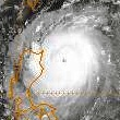 1983-09-06-00 Typhoon Ellen.jpeg